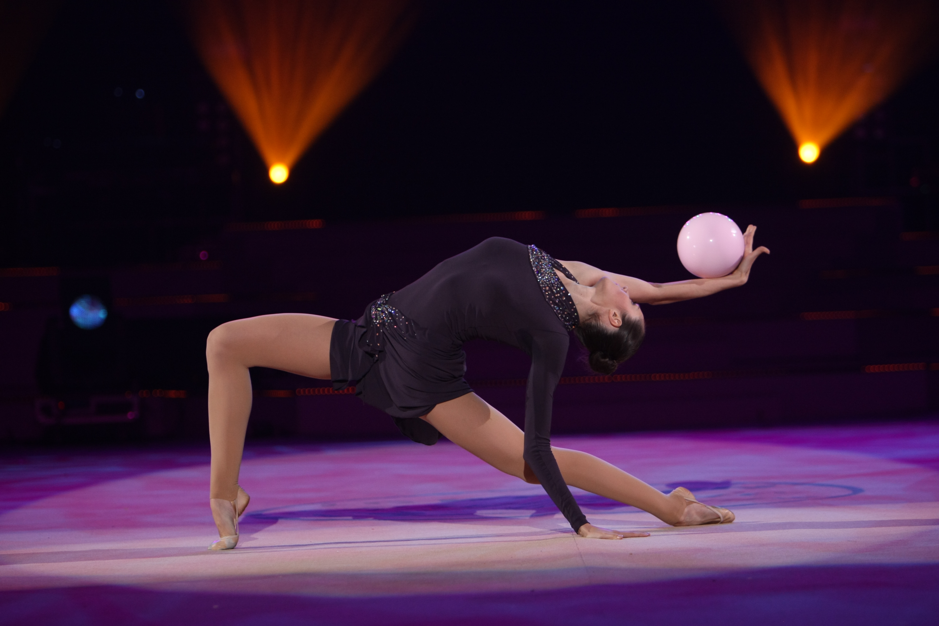 LG전자가 11일(土, 오후 3시), 12일(日, 오후 2시) 양일간 고려대학교 화정체육관 특설무대에서 국내 최초 리듬체조 갈라쇼인 ‘LG WHISEN Rhythmic All Stars 2011’ 행사를 개최했다. 사진은 11일 고려대학교 화정체육관 특설무대에서 열린 ‘LG WHISEN Rhythmic All Stars 2011’ 행사에서 LG ‘휘센’ 광고모델인 손연재(18세, 세종고) 선수를 비롯해 국내외 전•현역 리듬체조 스타들이 총출동해 멋진 리듬체조를 보여줬다.